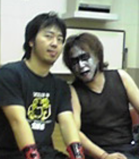 ササメとグレートユタ